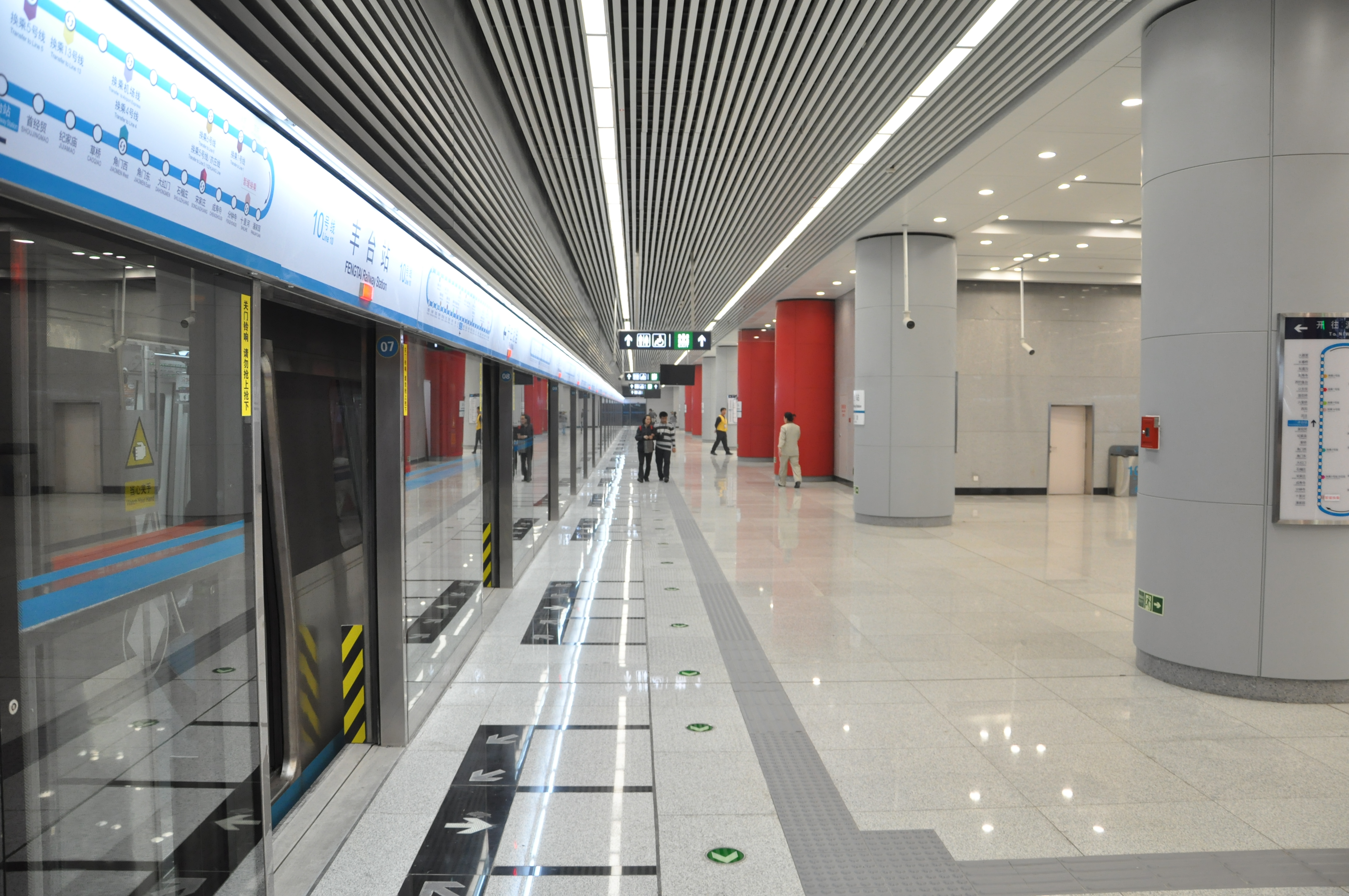 北京地铁10号线丰台站站台